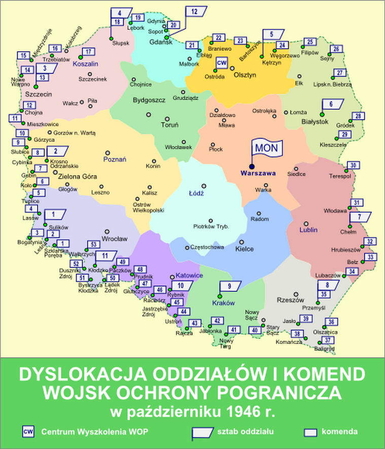 Dyslokacja oddziałów i komend Wojsk Ochrony Pogranicza w październiku 1946 r.